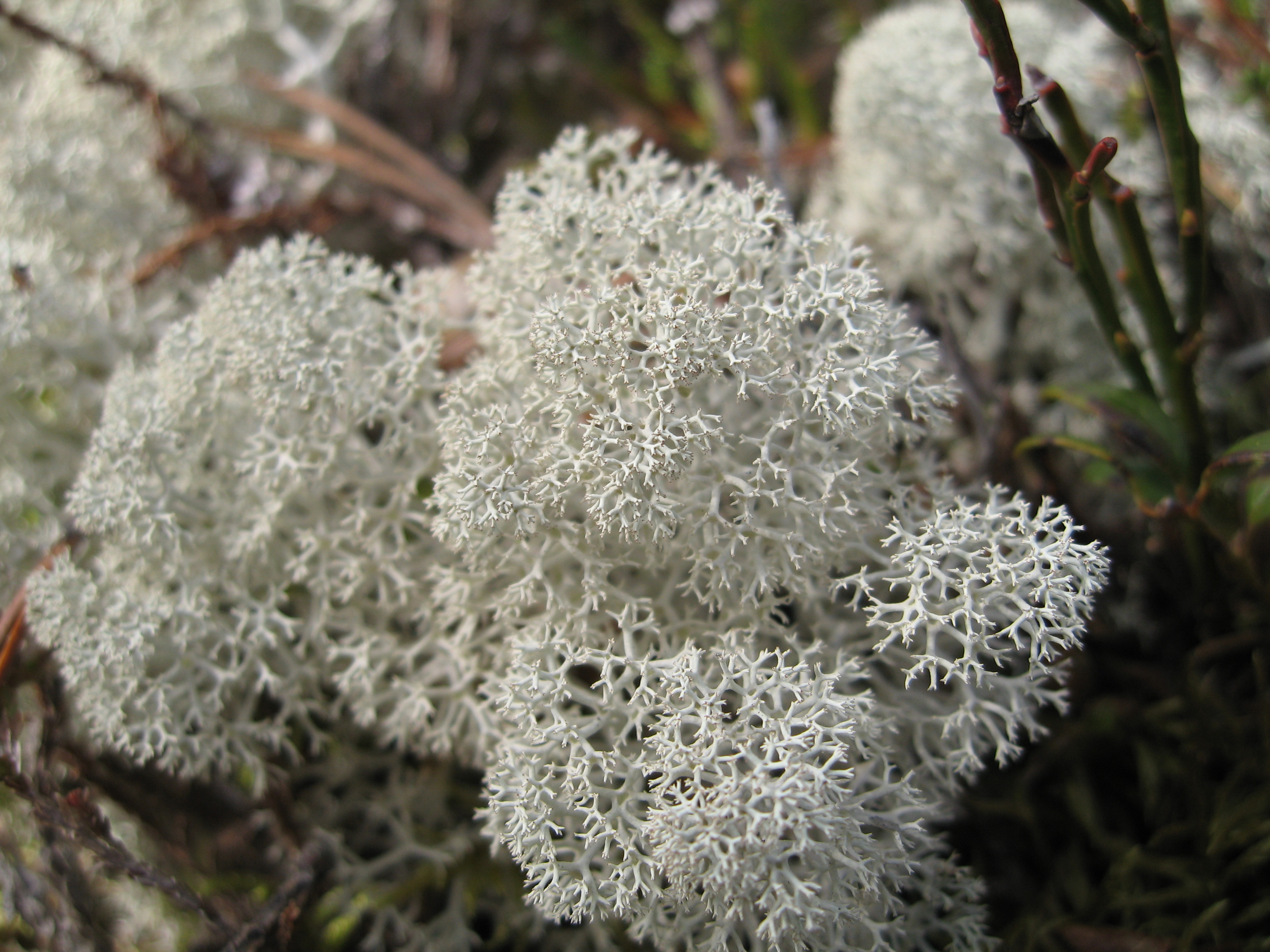 Kvitkrull